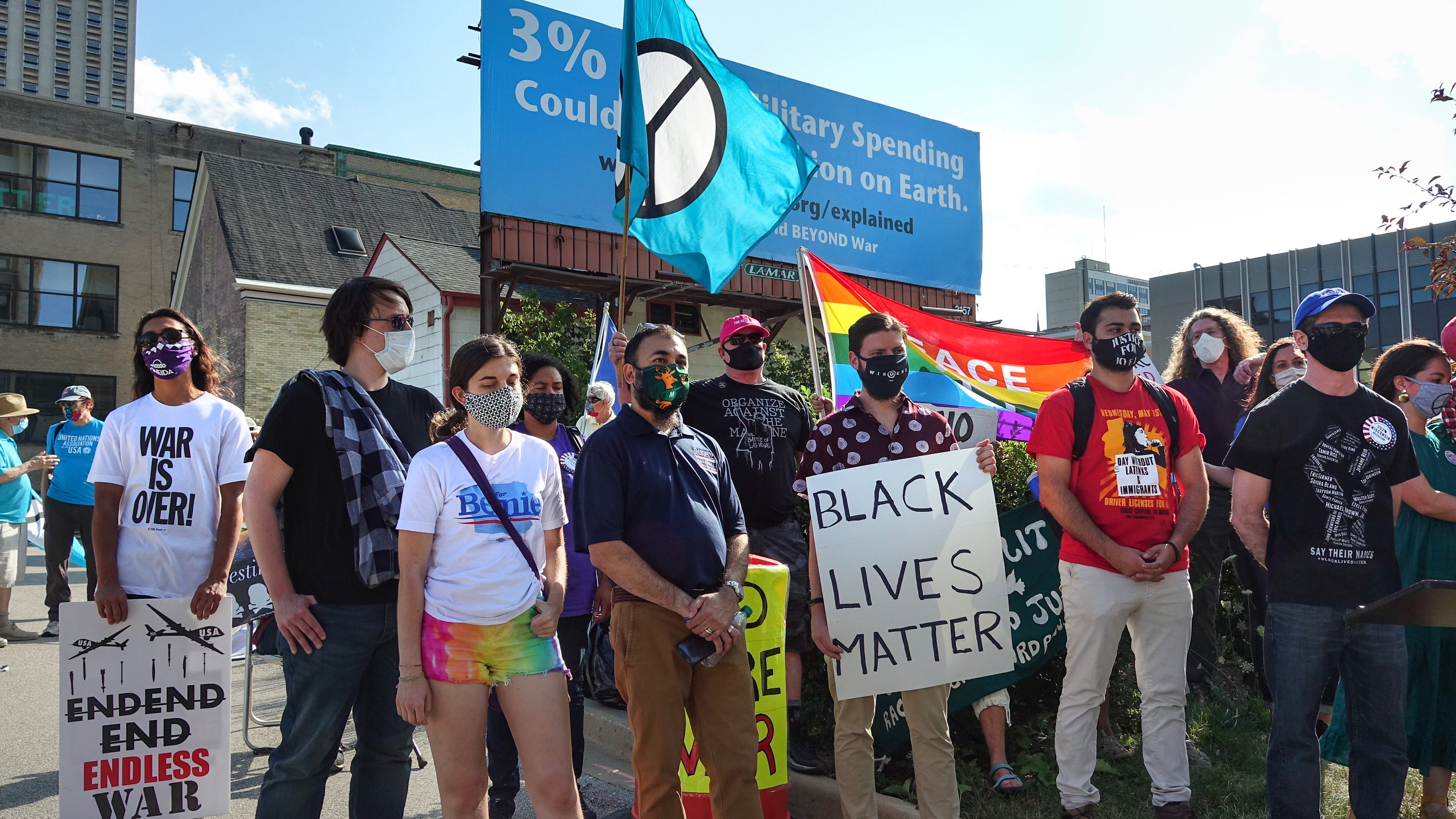 Peace-58